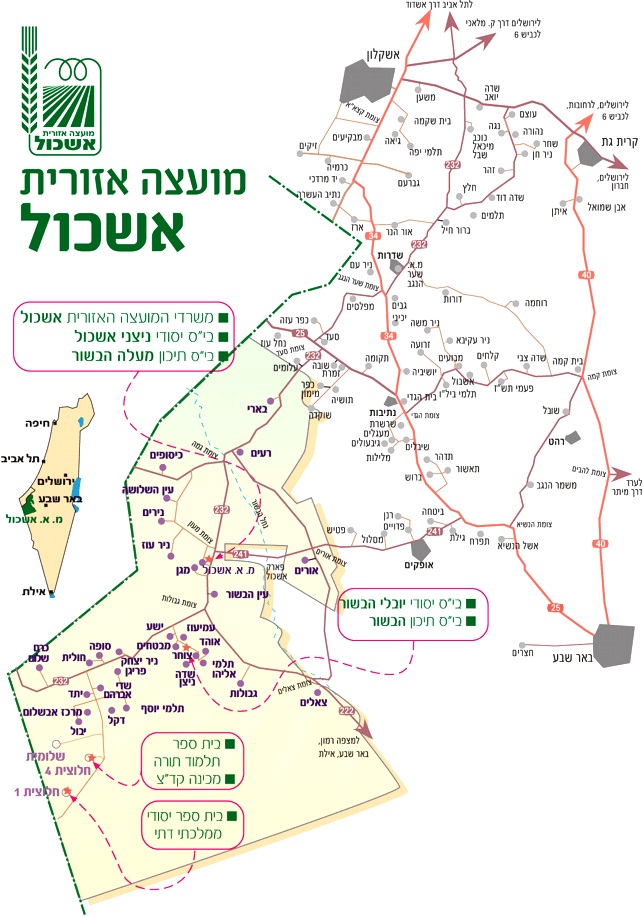 מועצה אזורית אשכול על המפה.